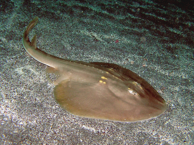 ウチワザメ Platyrhina tangi